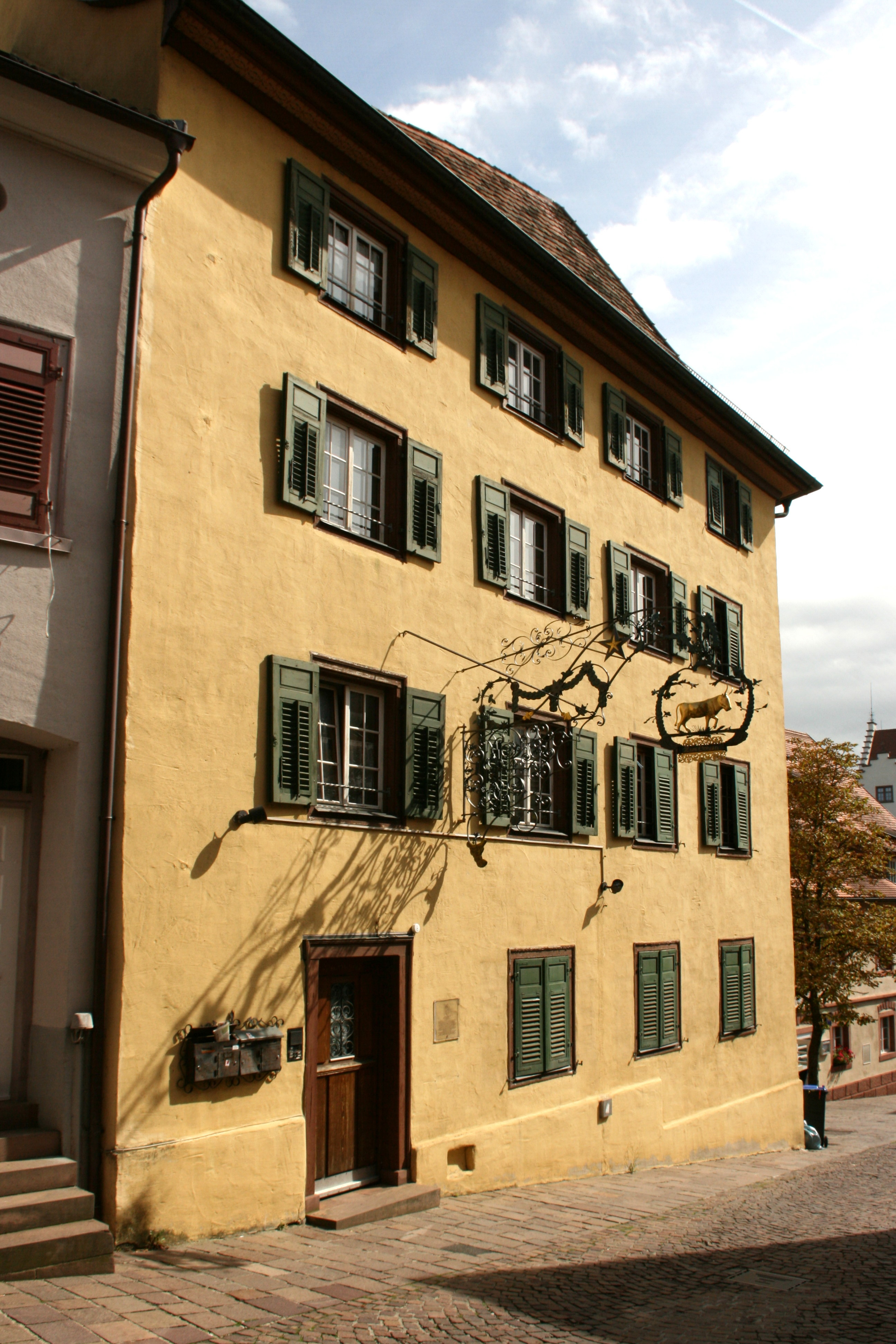 “Ochsen”, 1471 erwähnt als Stadthaus der Freiherren von Reischach, Ende des 16. Jahrhunderts im Besitz der Familie Vogler, im 19. Jahrhundert umfangreiche Umbauten und Einrichtung des Gasthausen "Ochsen", seit Mitte des 20. Jahrhunderts Wohnhaus, Hauptstraße in Engen